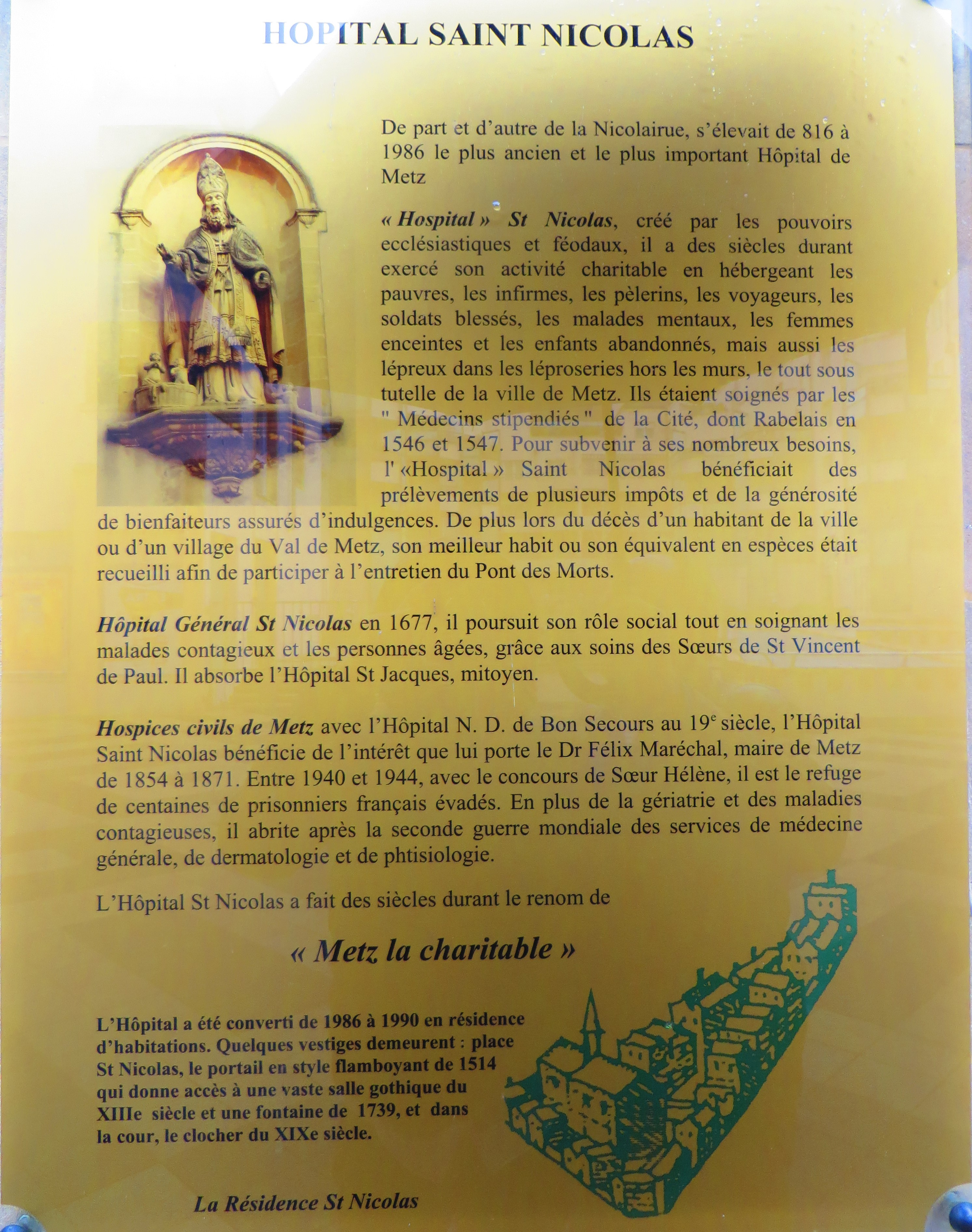 plate instruction hospice Saint Nicolas Metz